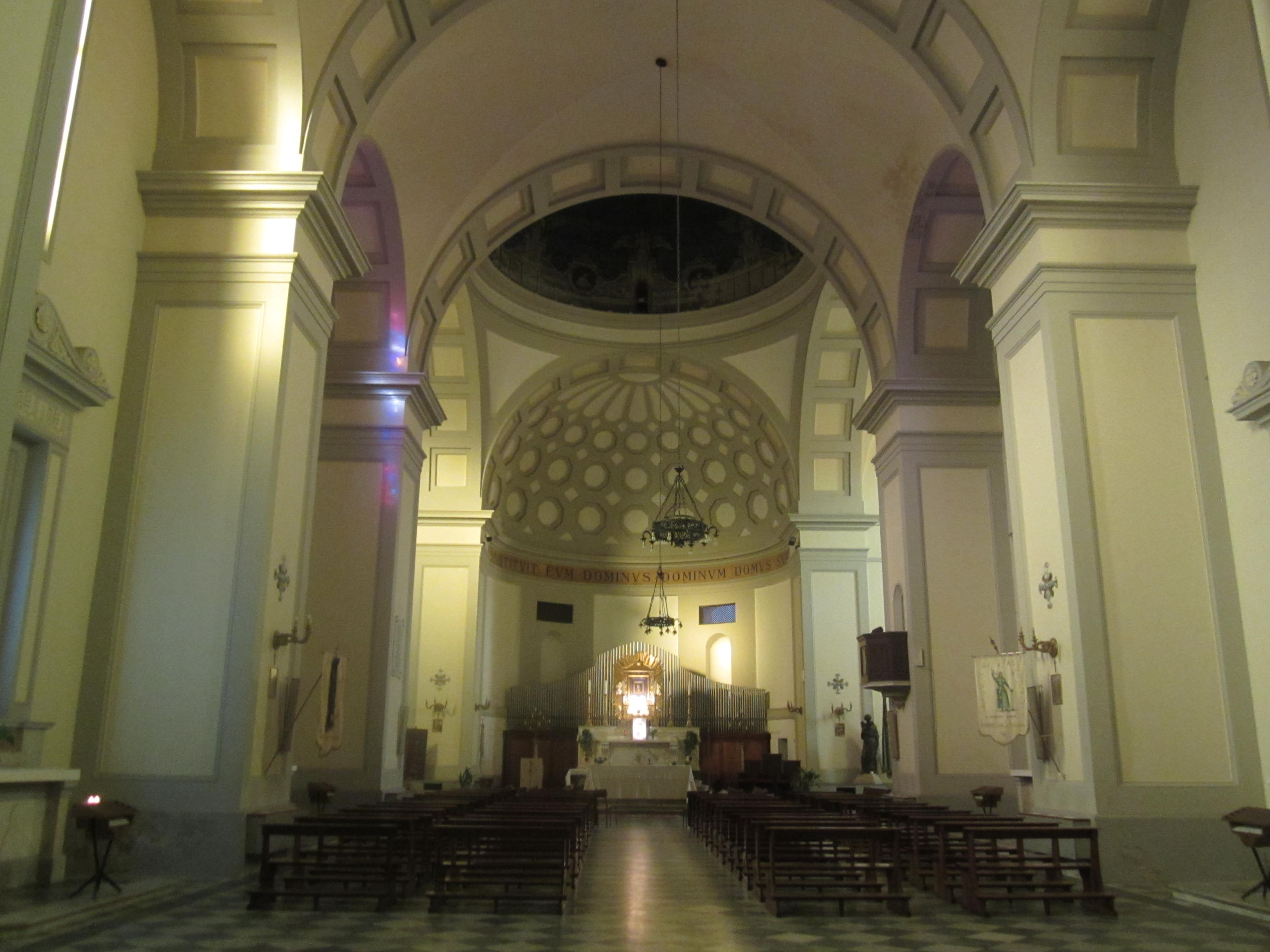 Interno della Chiesa di San Giuseppe in Piazza 2 Giugno a Livorno